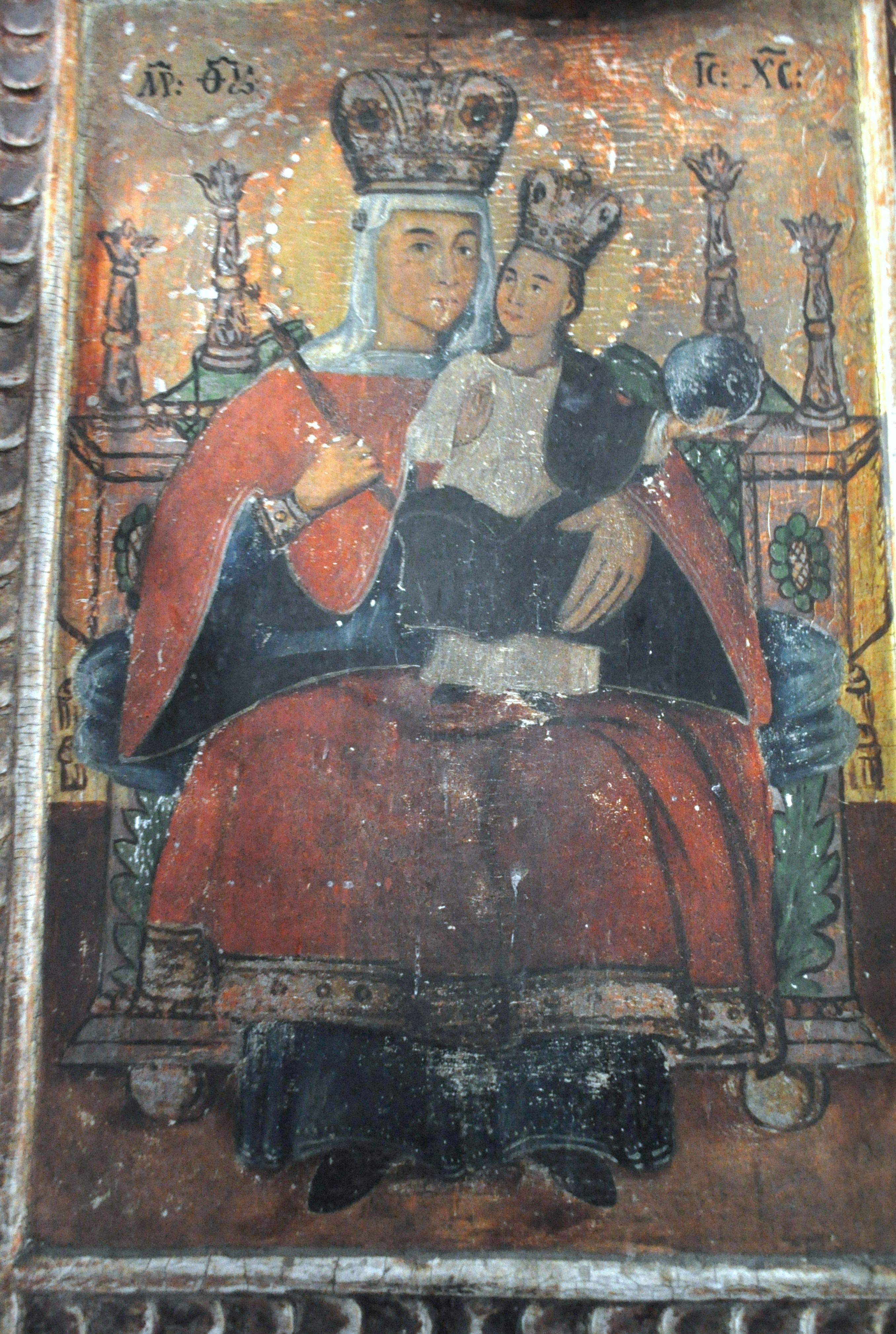 Biserica de lemn "Buna Vestire" din Ciungani, județul Hunedoara